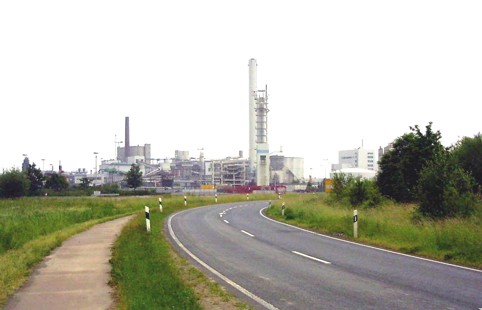 Zuckerfabrik Nordstemmen (Nordzucker AG), Niedersachsen, Deutschland